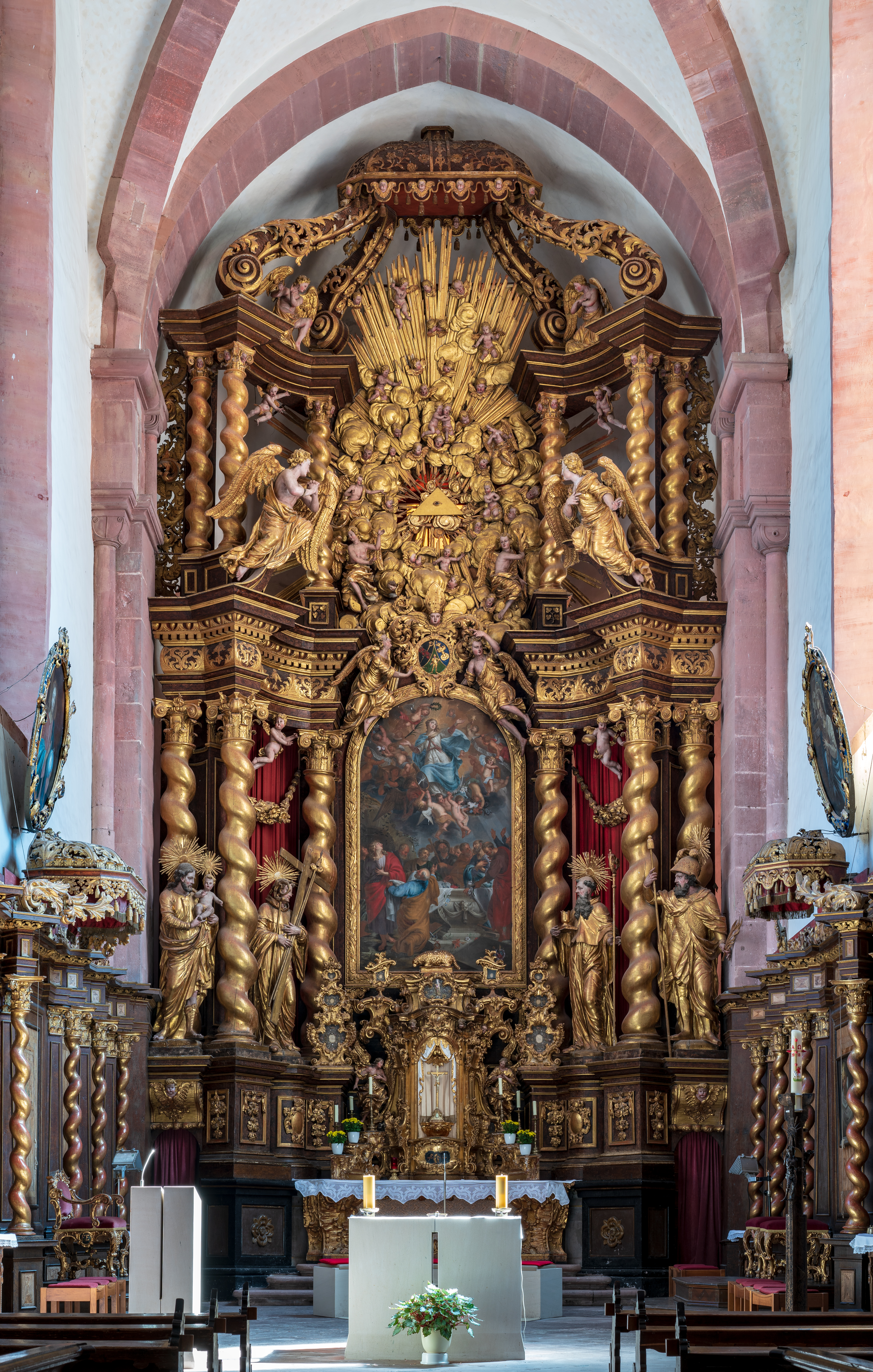 Kloster Bronnbach im Taubertal (bei Wertheim): Der Hochaltar in der Klosterkirche, datiert 1712. Viele Figuren stammen von Balthasar Esterbauer, das Altarblatt wurde schon 1670 von Oswald Onghers gemalt.